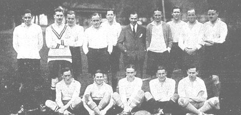 Equipo de rugby inglés de Valparaíso en 1925